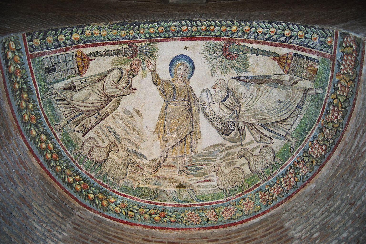 descripcióMausoleu de Santa Costanza. Roma. Mosaic "Traditio Legis".